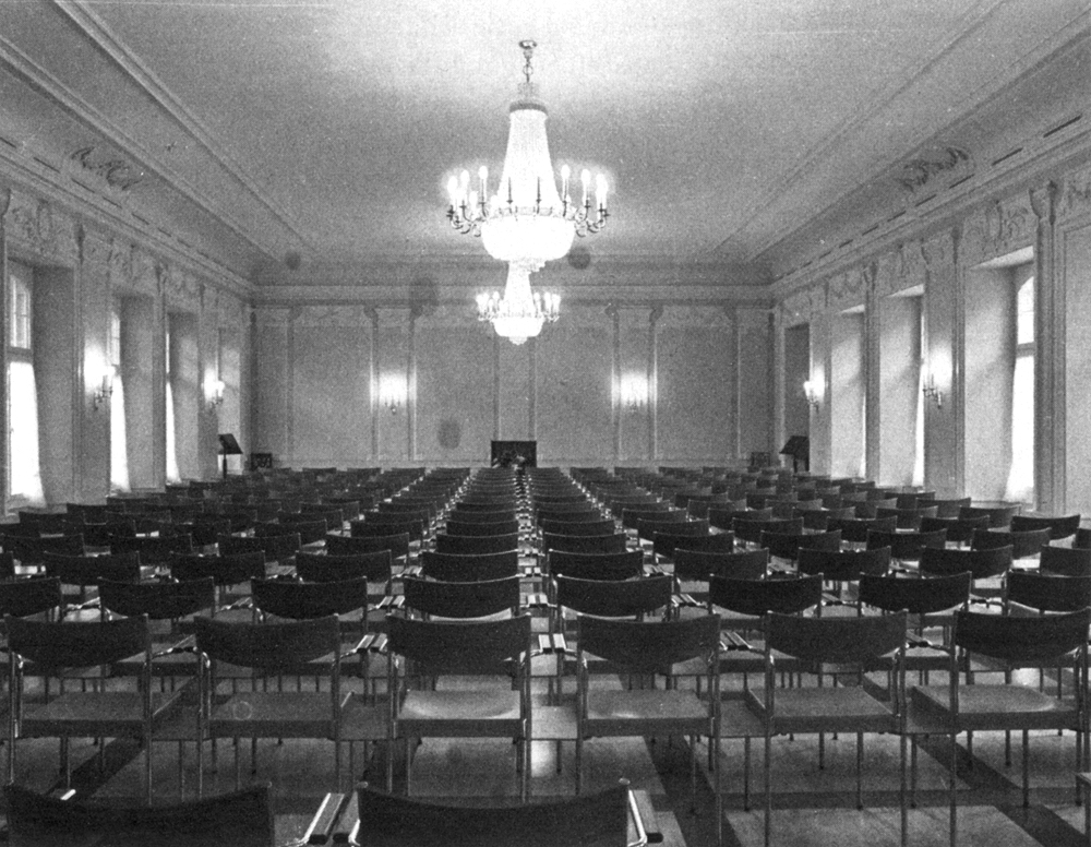 Der Bürgersaal im Rathaus Zofingen, Gründungsort der Gesellschaft für Schweizerische Kunstgeschichte.